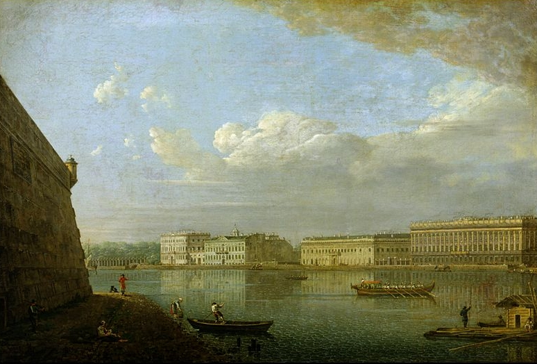 Вид Дворцовой набережной от Петропавловской крепости. Государственная Третьяковская галерея